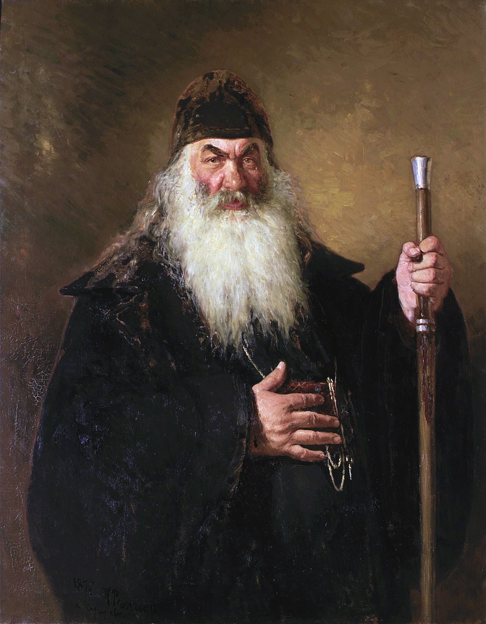 По словам Репина, его «Протодиакон» изображает собою «…экстракт наших дьяконов, этих львов духовенства, у которых ни на одну ноту не полагается ничего духовного, - весь он плоть и кровь, лупоглазие, зёв и рёв, рёв бессмысленный, но торжественный и сильный, как сам обряд в большинстве случаев. Мне кажется, у нас дьякона есть единственный отголосок языческого жреца, славянского ещё и это мне всегда виделось в моём любезном дьяконе – как самом типичном, самом страшном из всех дьяконов. Чувственность и артистизм своего дела, больше ничего!». Прообразом послужил Чугуевский протодиакон Иван Уланов. (И.Н. Крамской. Переписка, т.2, с. 360.)